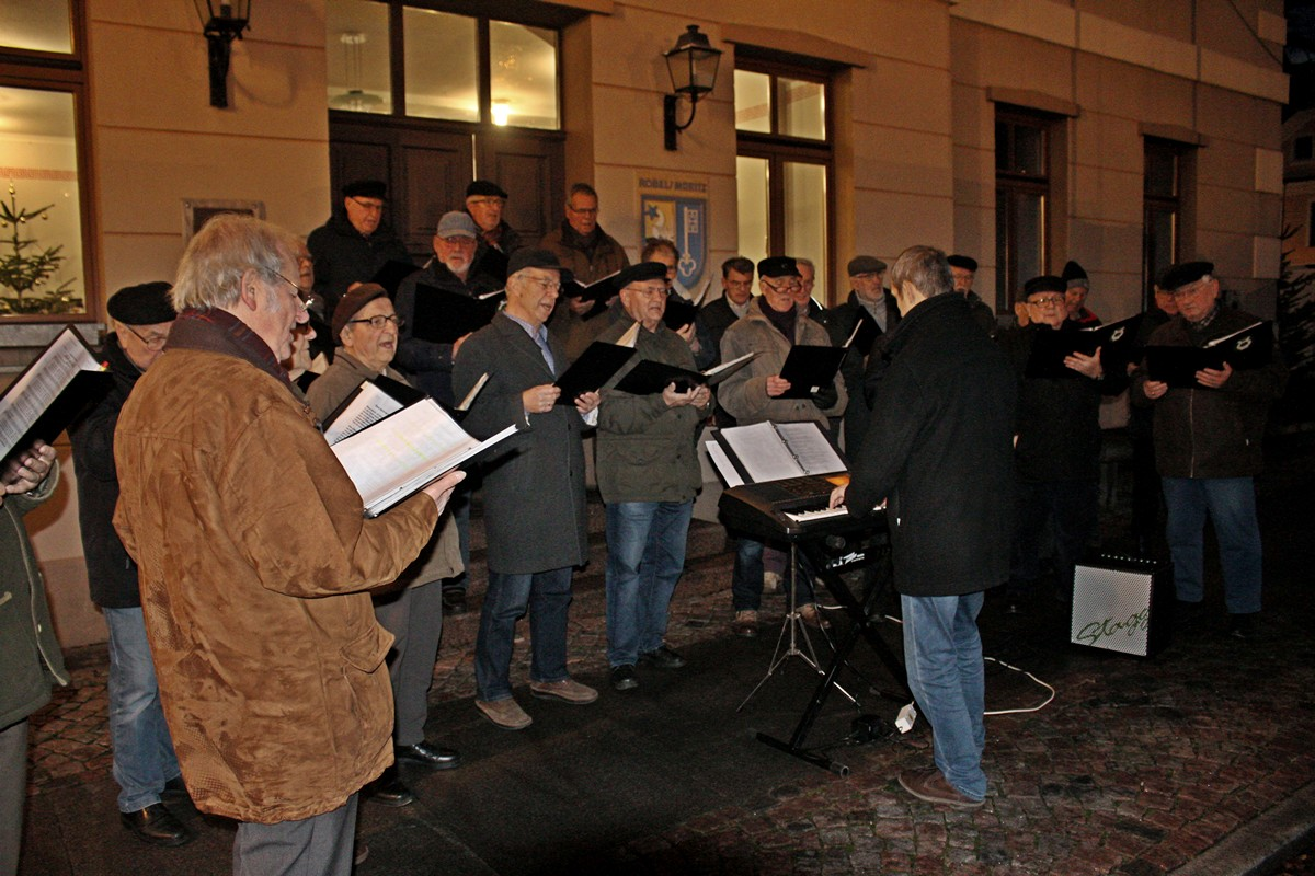 Männerchor Röbel beim Adventssingen